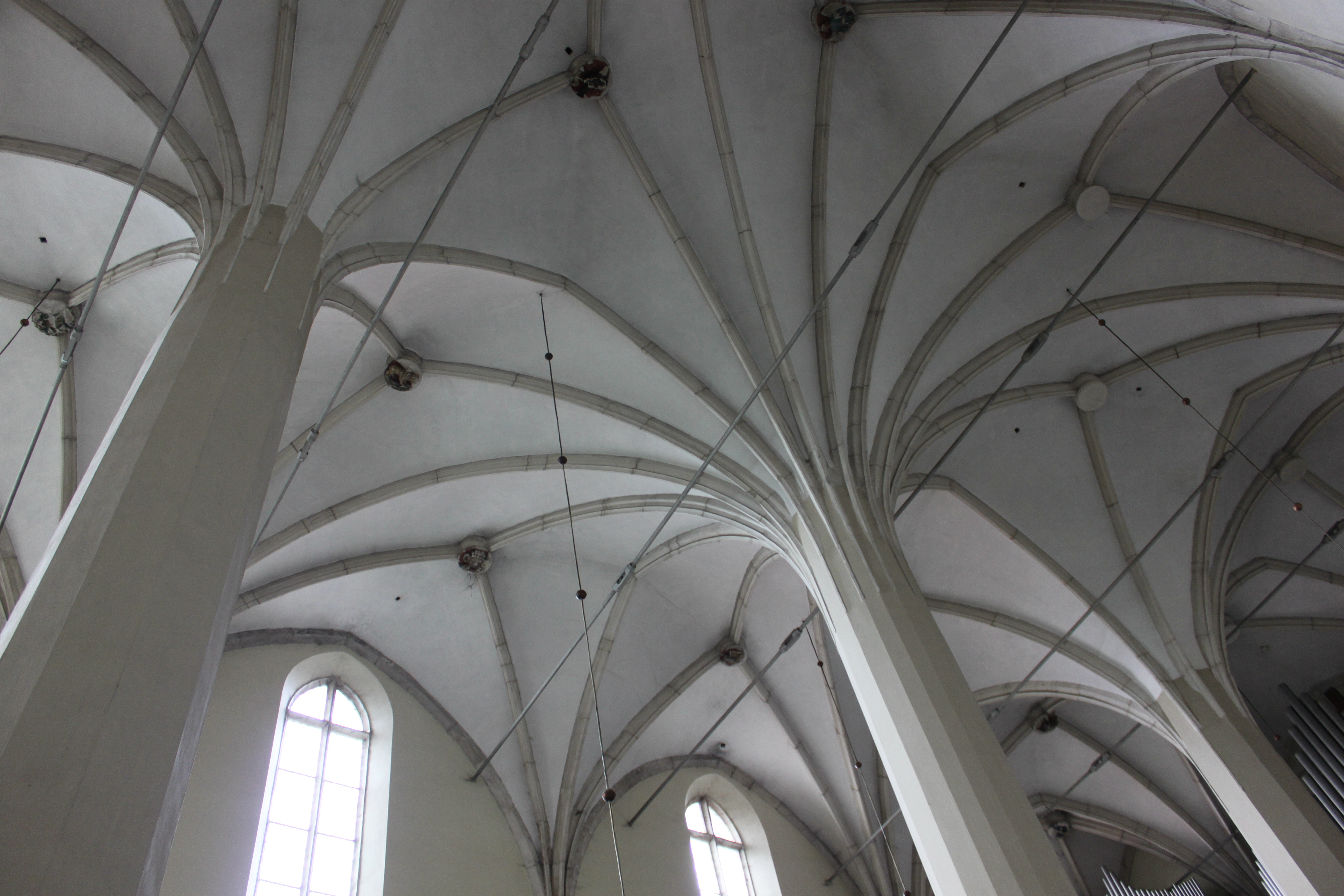 Wiślica, kościół par. pw. Narodzenia NMP, lata 1350-1380, poł. XVII w., lata 1919-1926